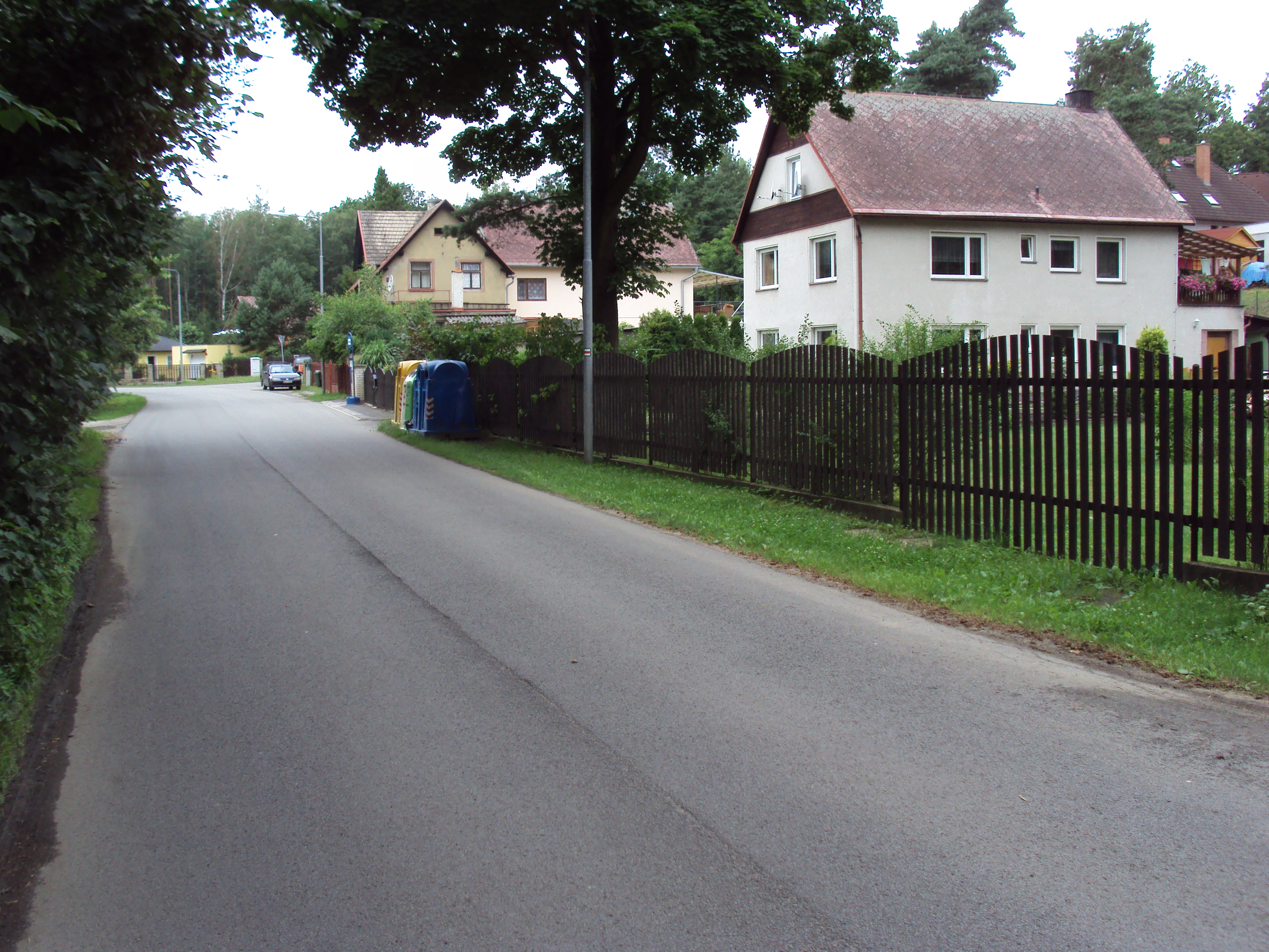 Vesnice Žízníkov (Česká Lípa), průběžná silnice s bus zastávkou